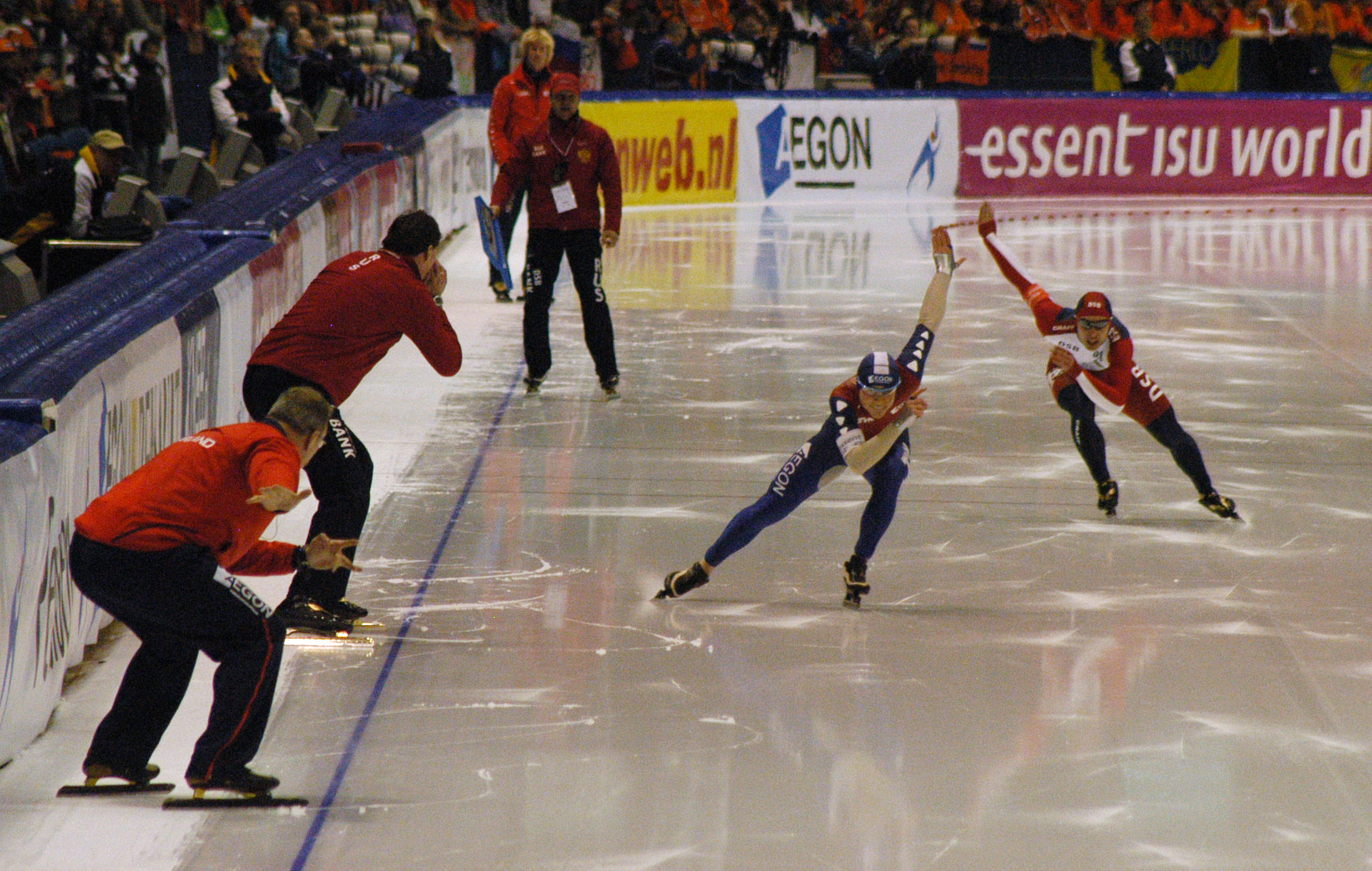 Jan Smeekens (NED) at a world cup speedskating in Heerenveen, the Netherlands.